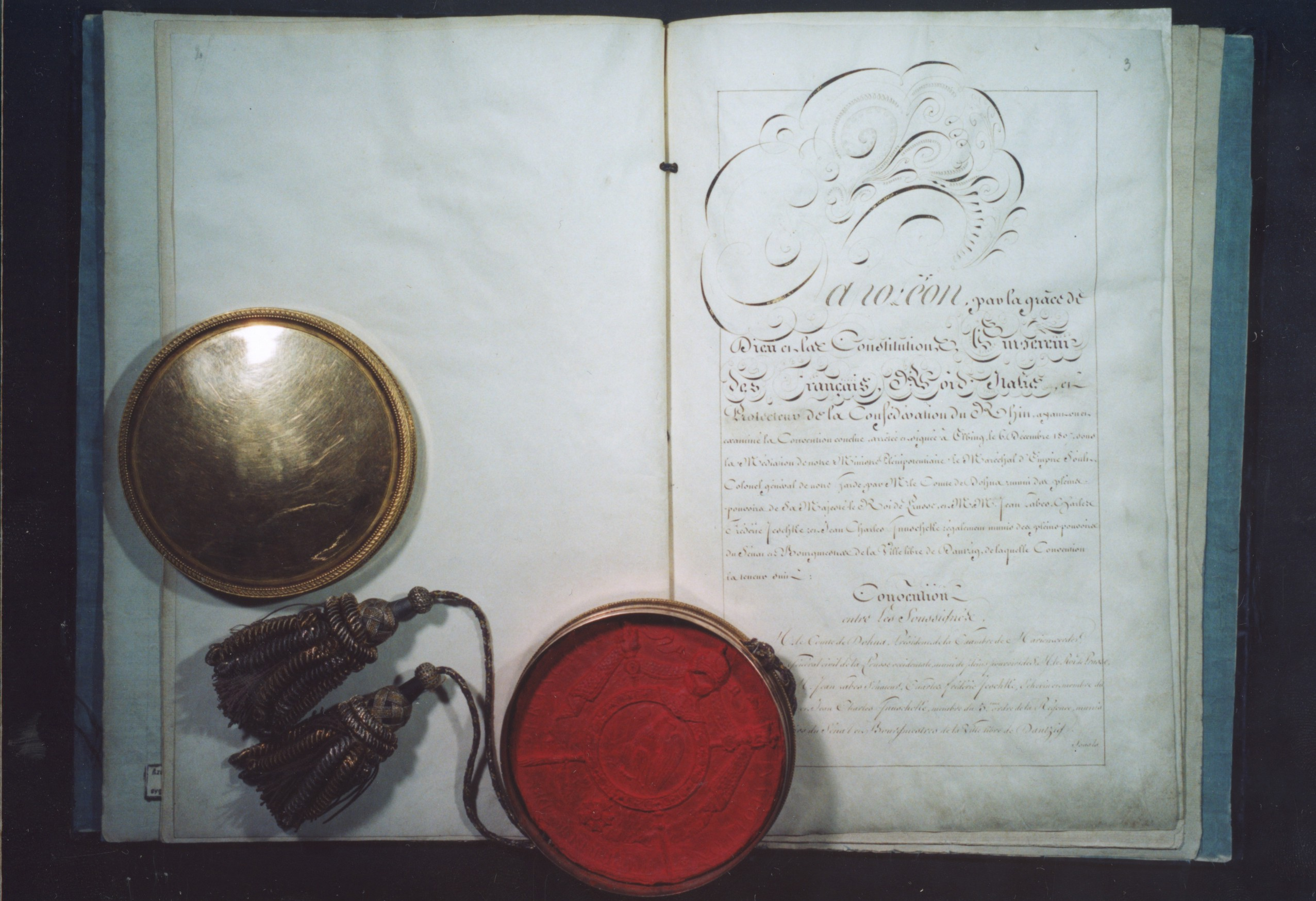 Napoleon cesarz Francji w dniu 5 II 1808 zatwierdza w Paryżu konwencję elbląską z 6 XII 1807 w sprawie ustanowienia granic Wolnego Miasta Gdańska. Miejsce: Elbląg (podpisanie konwencji), Paryż (ratyfikacja) Opis zewnętrzny: Oryginał; jęz. francuski; składka z kart pergaminowych oprawna w granatowy aksamit, obrzeża obszyte złotą nicią; 260x380; pieczęć 1; Napoleon Bonaparte, Jean Baptiste Champagny, Hugues Maret; 8 kart, w tym 3 zapisane (6 stron) Miejsce przechowywania: Archiwum Państwowe w Gdańsku, Akta Miasta Gdańska. Dyplomy i korespondencja dotycząca terytorium gdańskiego, sygn. 300, D/79, nr 138 Autor komentarza: Aleksandra Skibicka